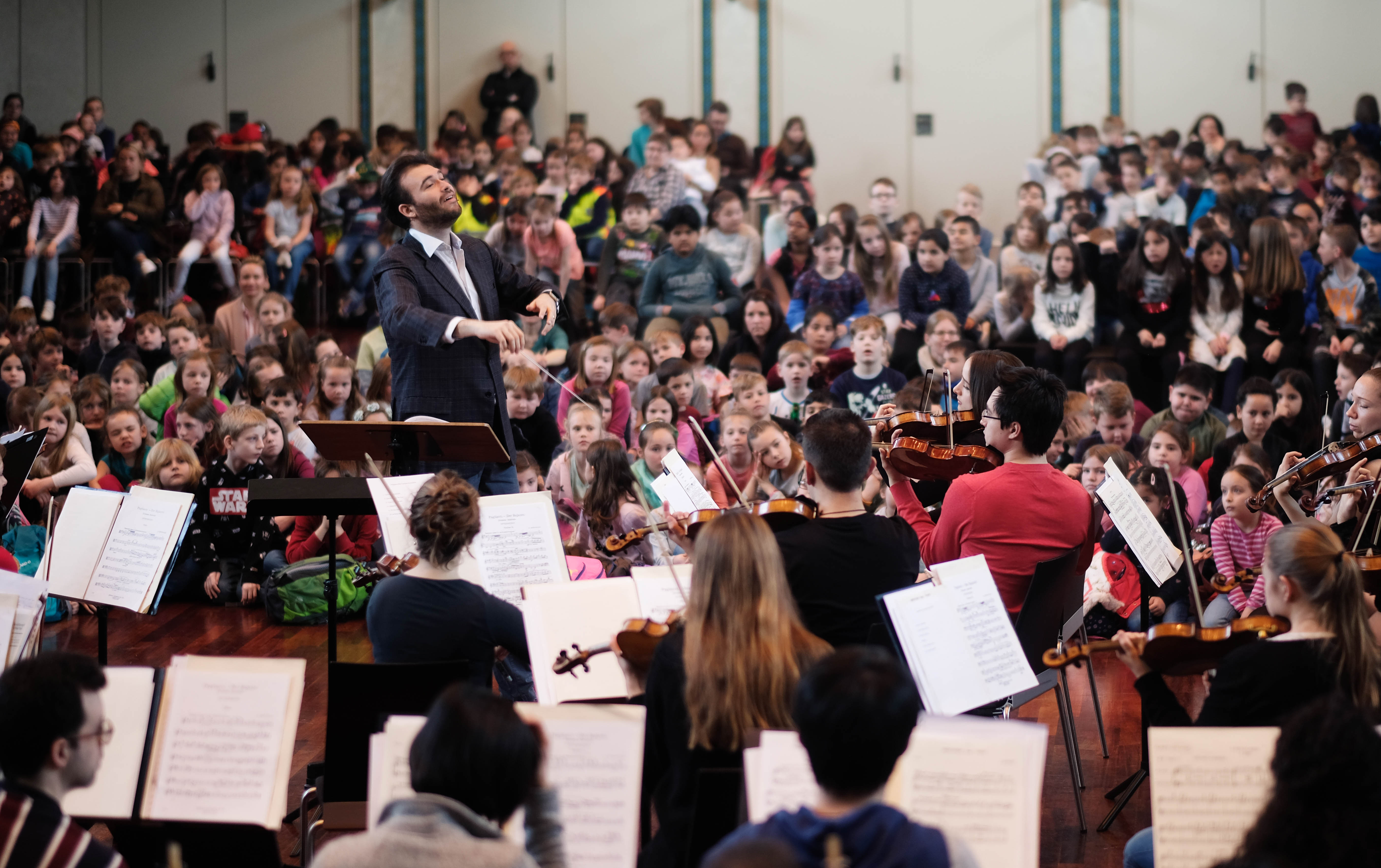 Bildungskonzert der Mannheimer Philharmoniker im Mannheimer Rosengarten